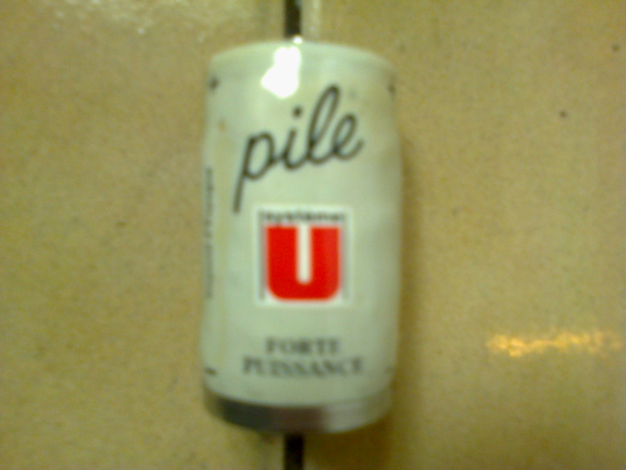 Pile LR14 Super U